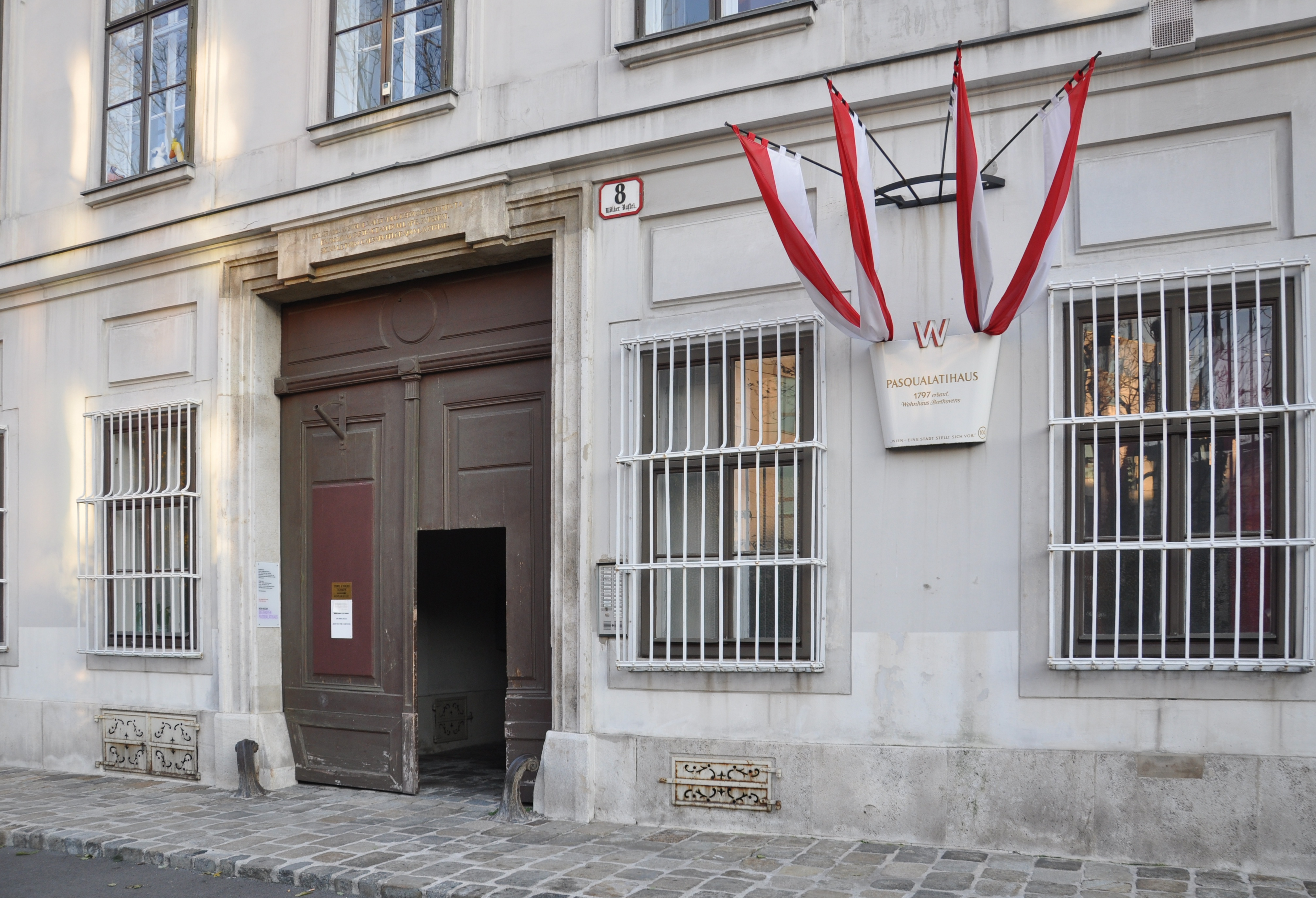 Wien, Mölkerbastei, Pasqualati-Haus